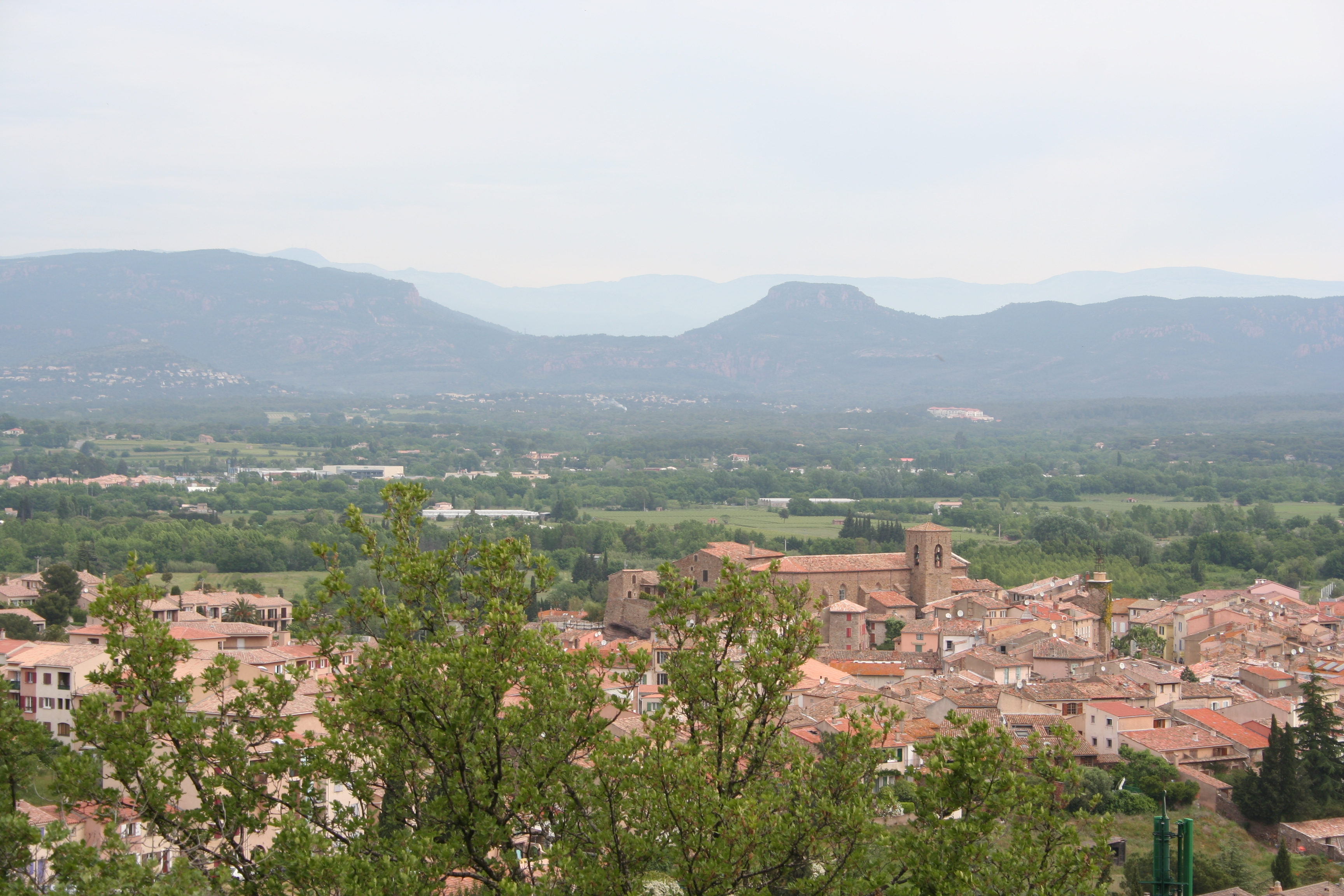 Roquebrune-sur-Argens, Var département, France, from the southwest